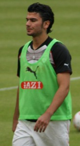 Serdar Taşçı